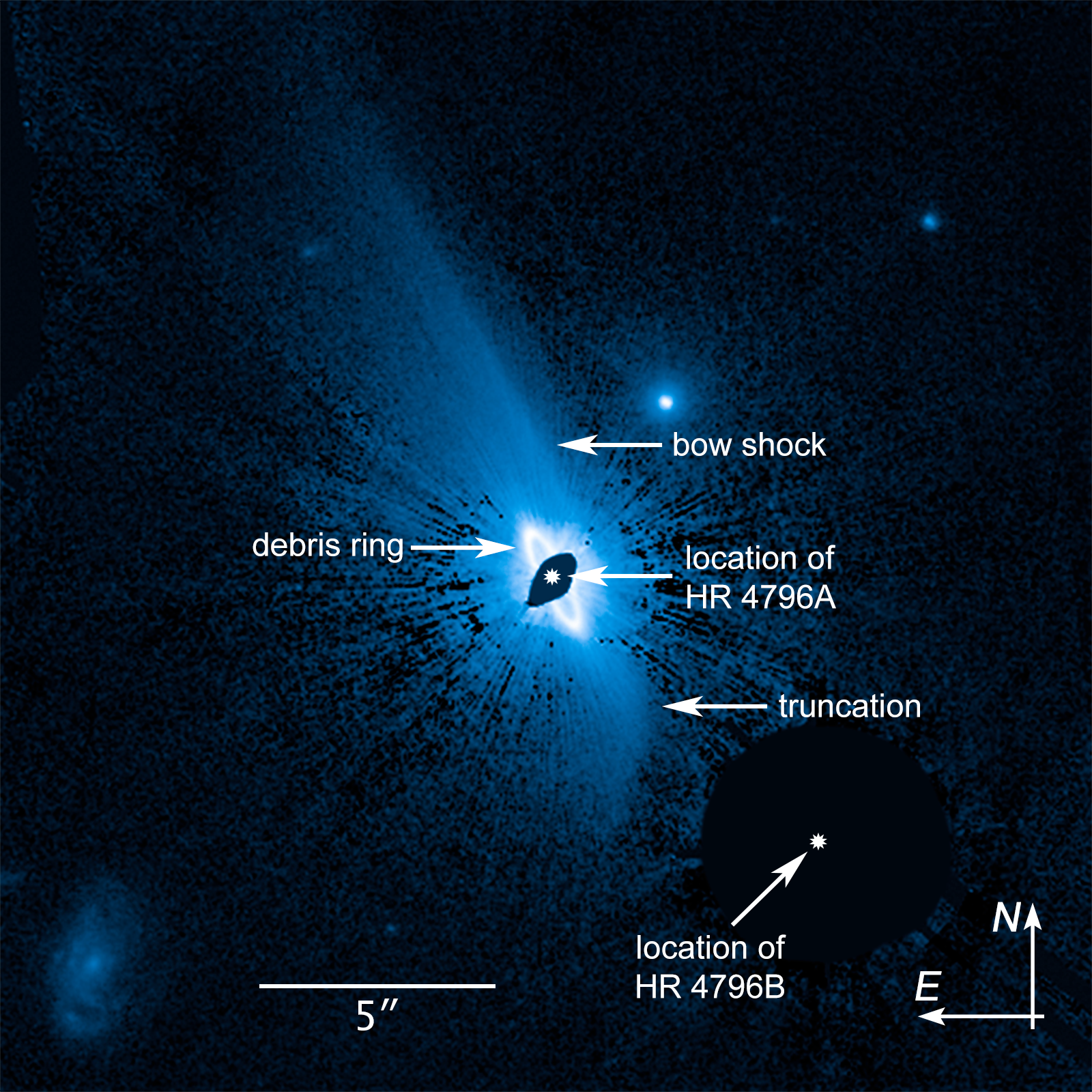 Газопылевое облако вокруг двойной звездной системы HR 4796 в созвездии Центавр